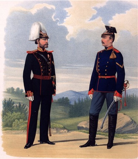 Фейерверкер Гв. Конно-Артиллерийской бригады и Рядовой Л. Гв. Уланского полка. (парадная и походная формы.) 2 Января 1874.